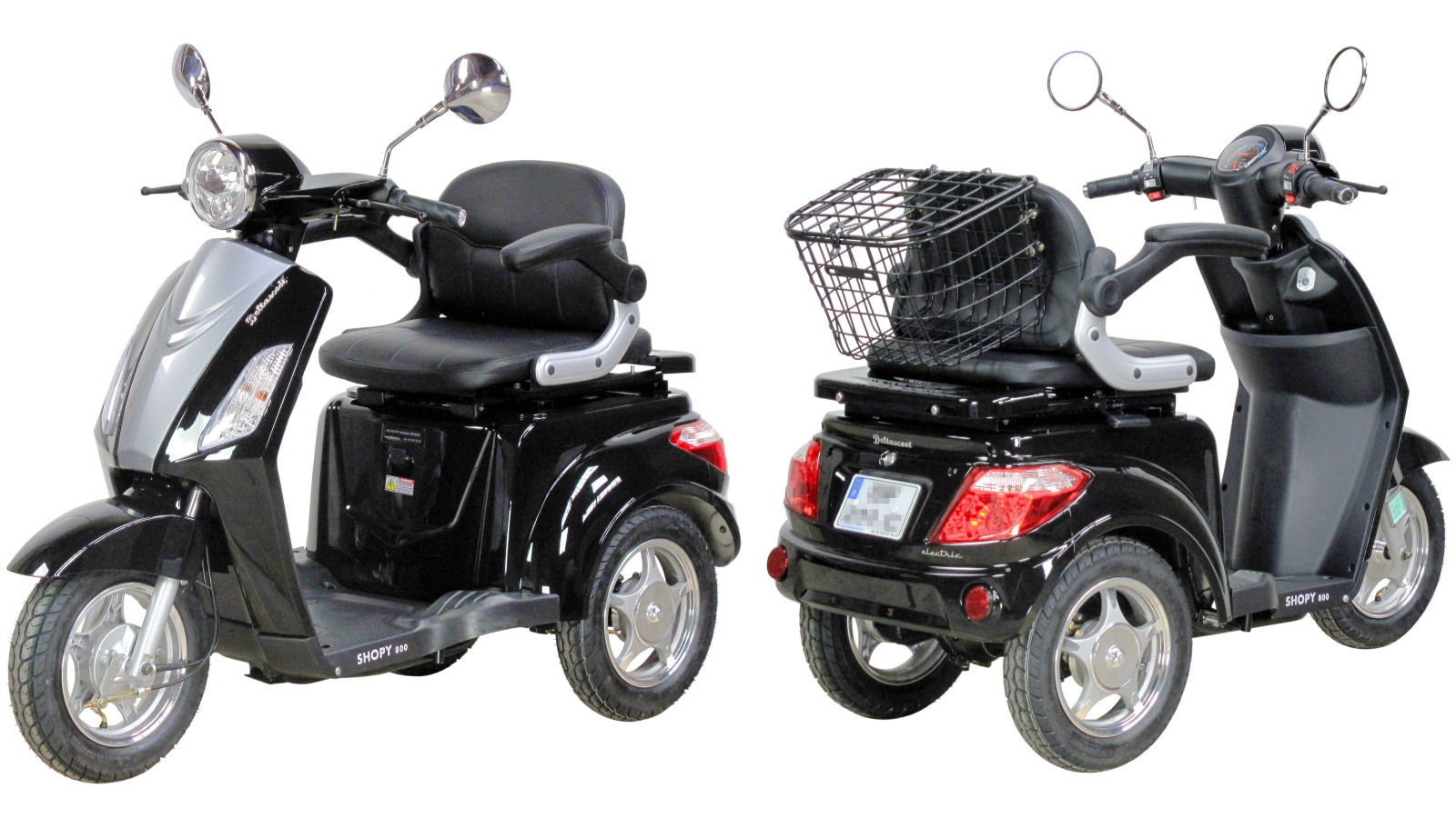 Scooter pour personne à mobilité réduite